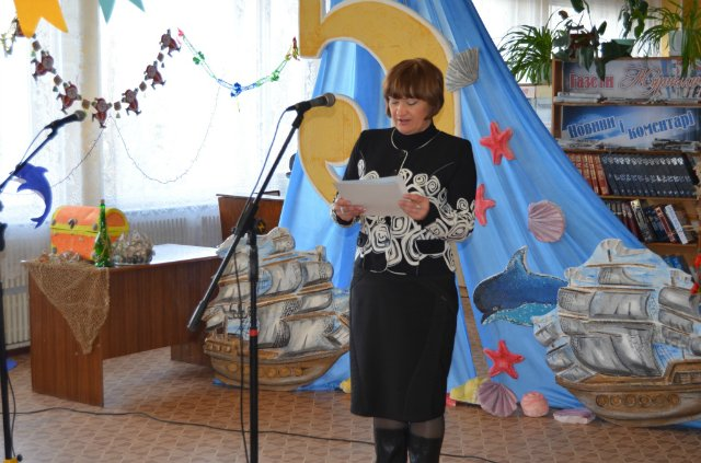 Шульга Тетяна Іванівна